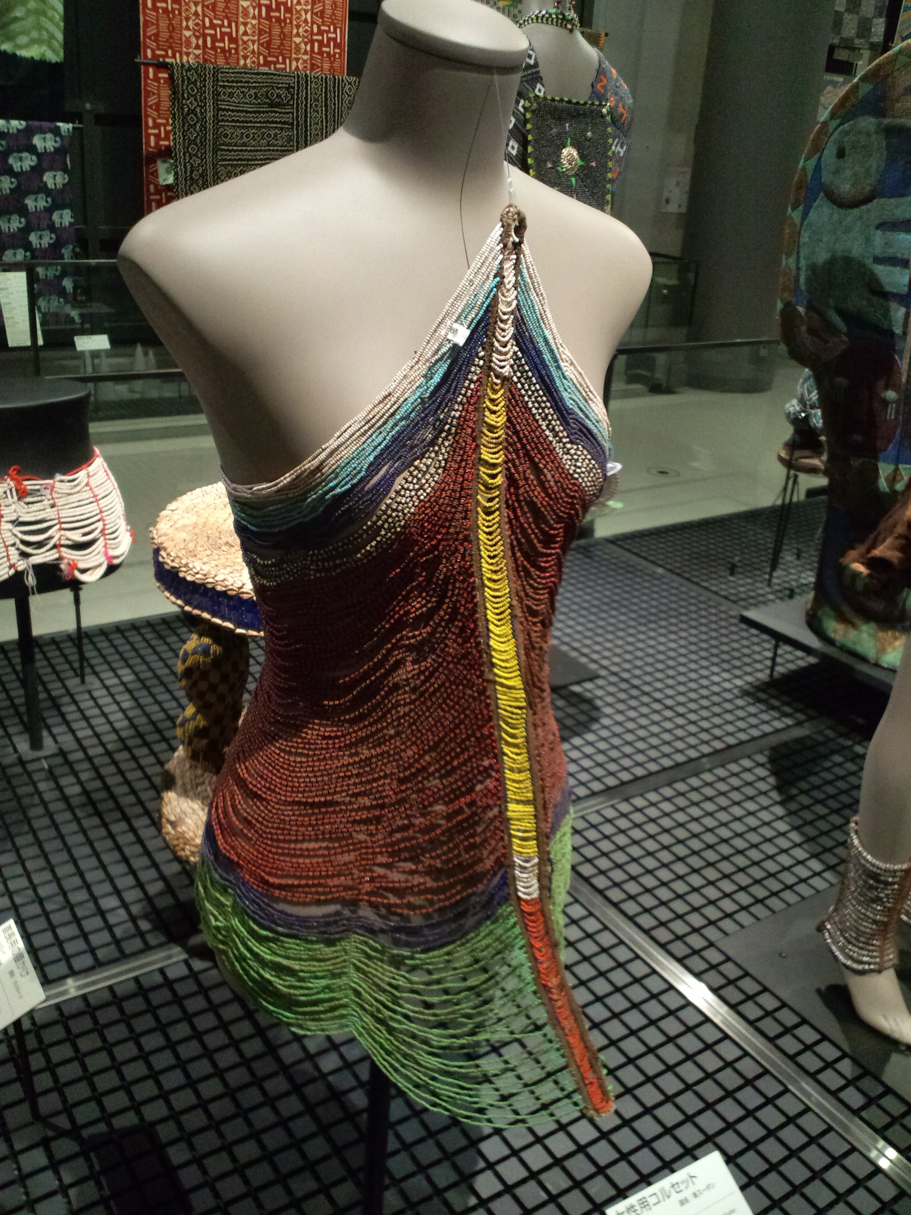 国立民族学博物館（大阪） 女性用コルセット（南スーダン、ディンカ族、2000年収集）